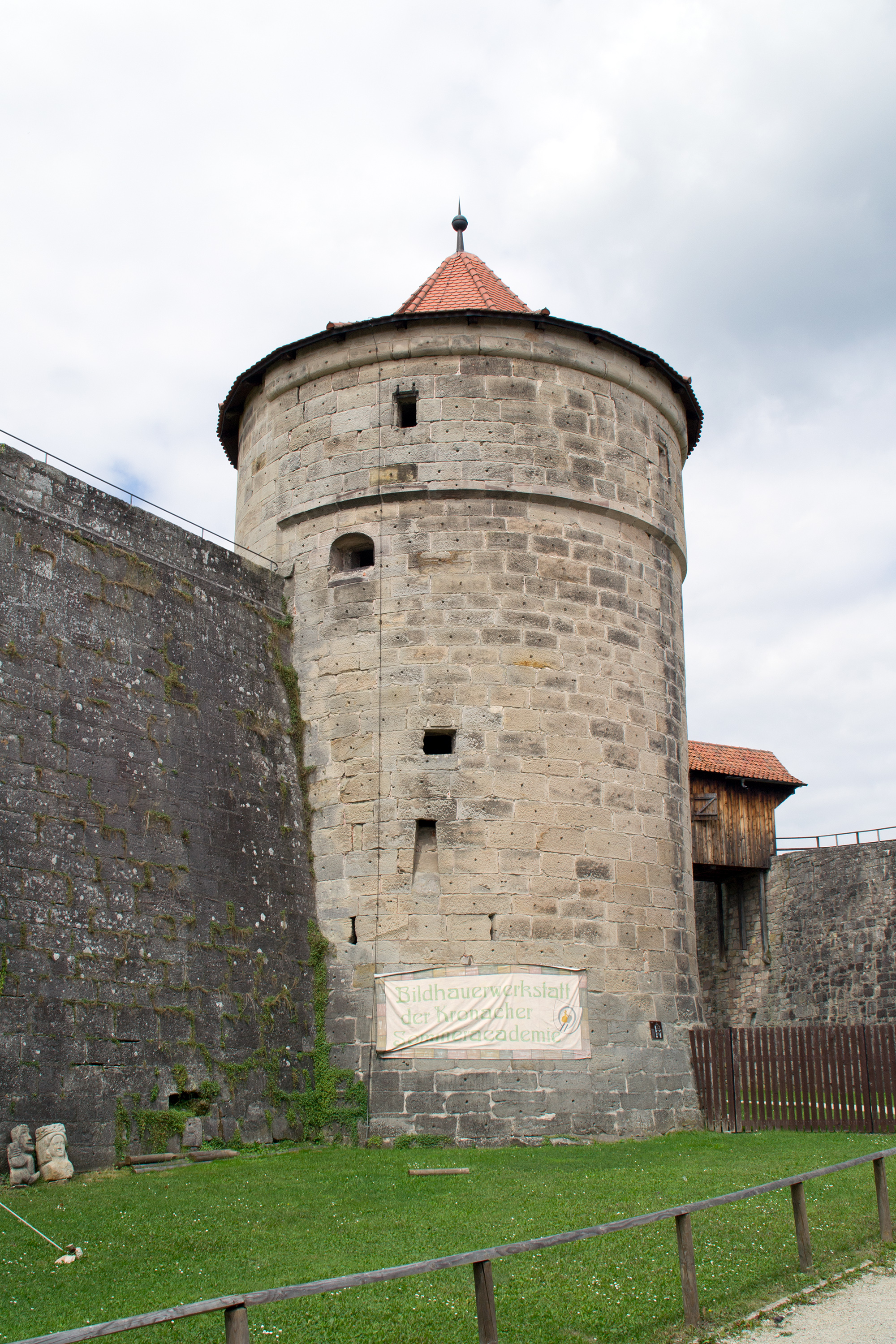 Salzturm auf der Festung Rosenberg in Kronach.